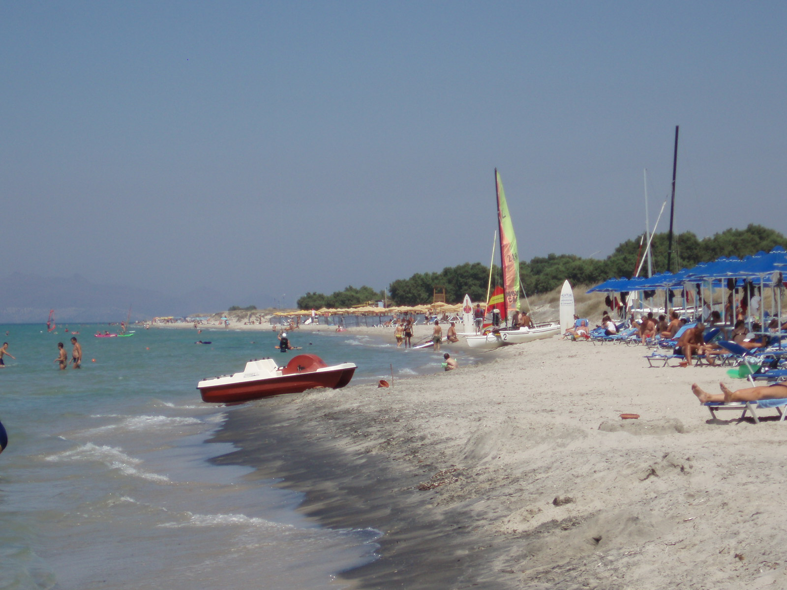 Marmari Beach